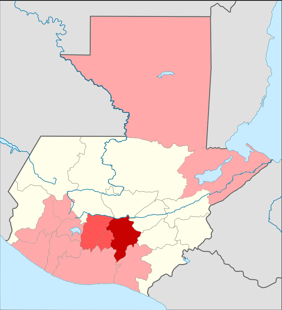 Departamentos de Guatemala afectados por casos de SARS-CoV-2 al 12 de abril de 2020